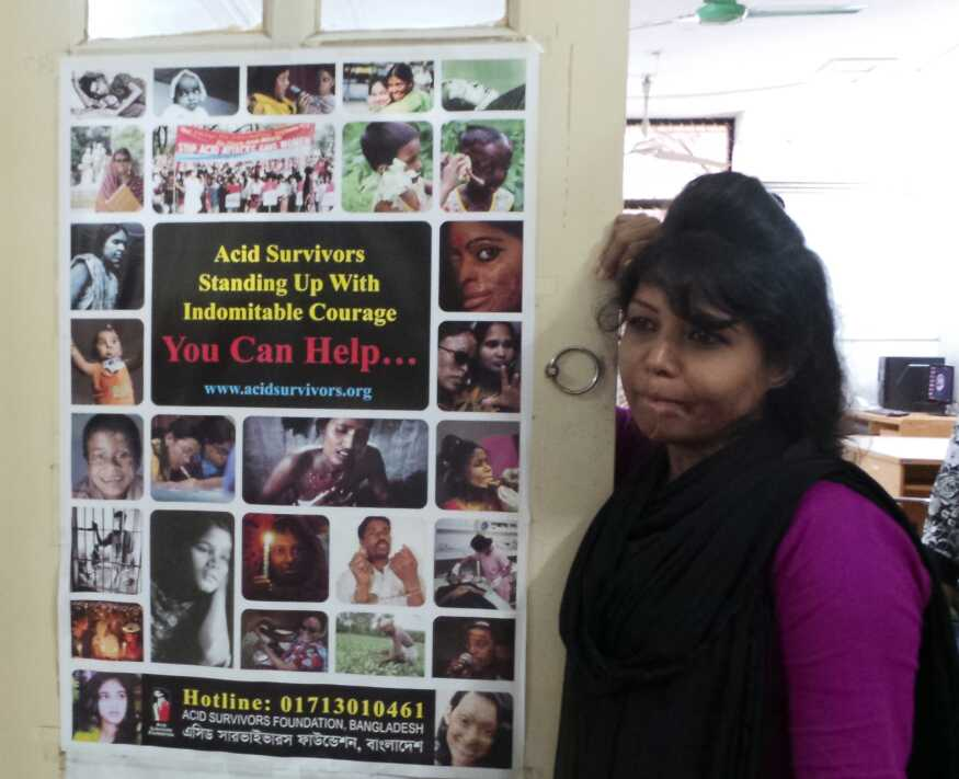 Bangladesh woman survivor of acid attack - Acid Survivors Foundation